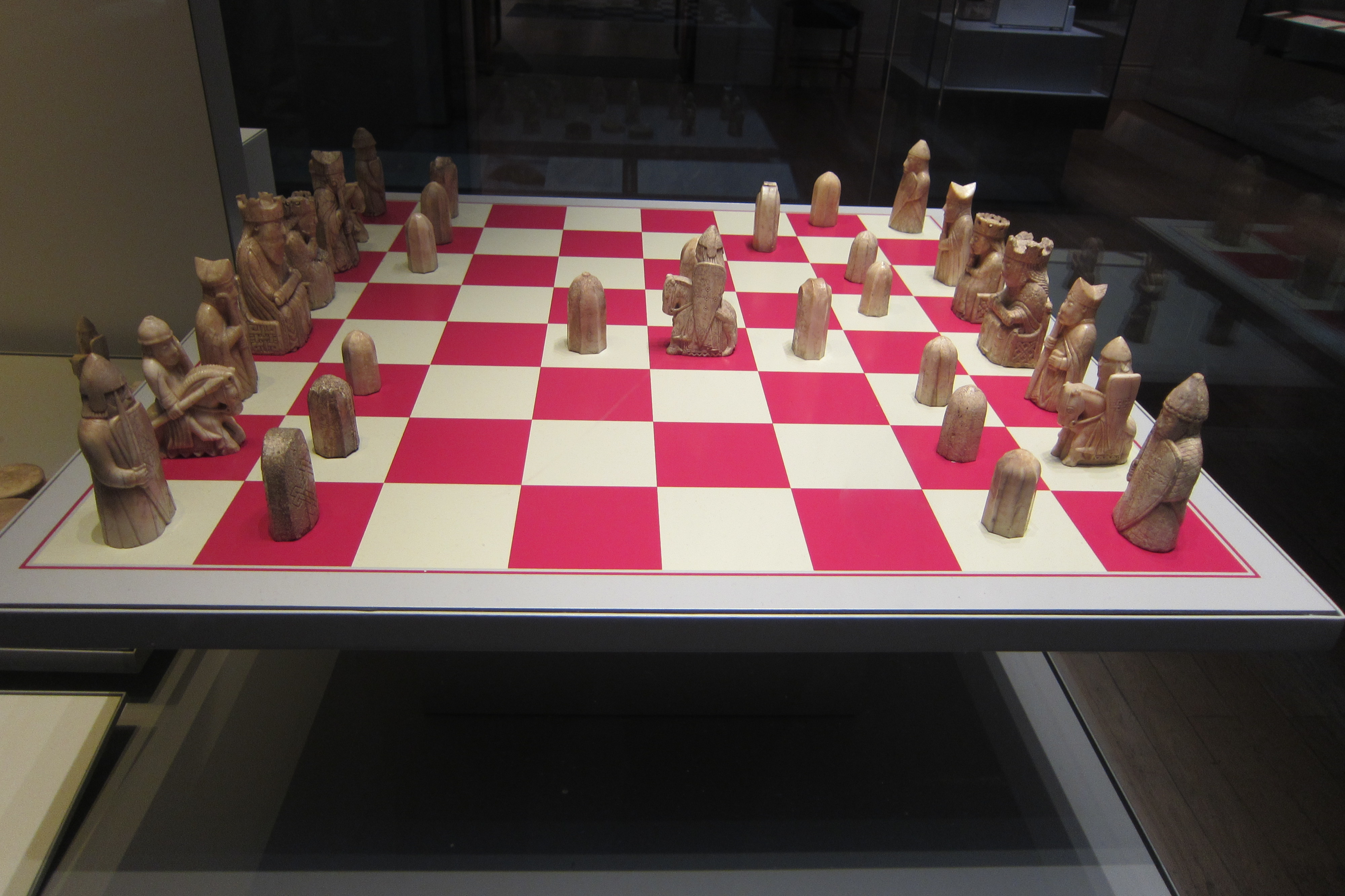 Lewis schaakstukken op rood wit velden, British Museum, London